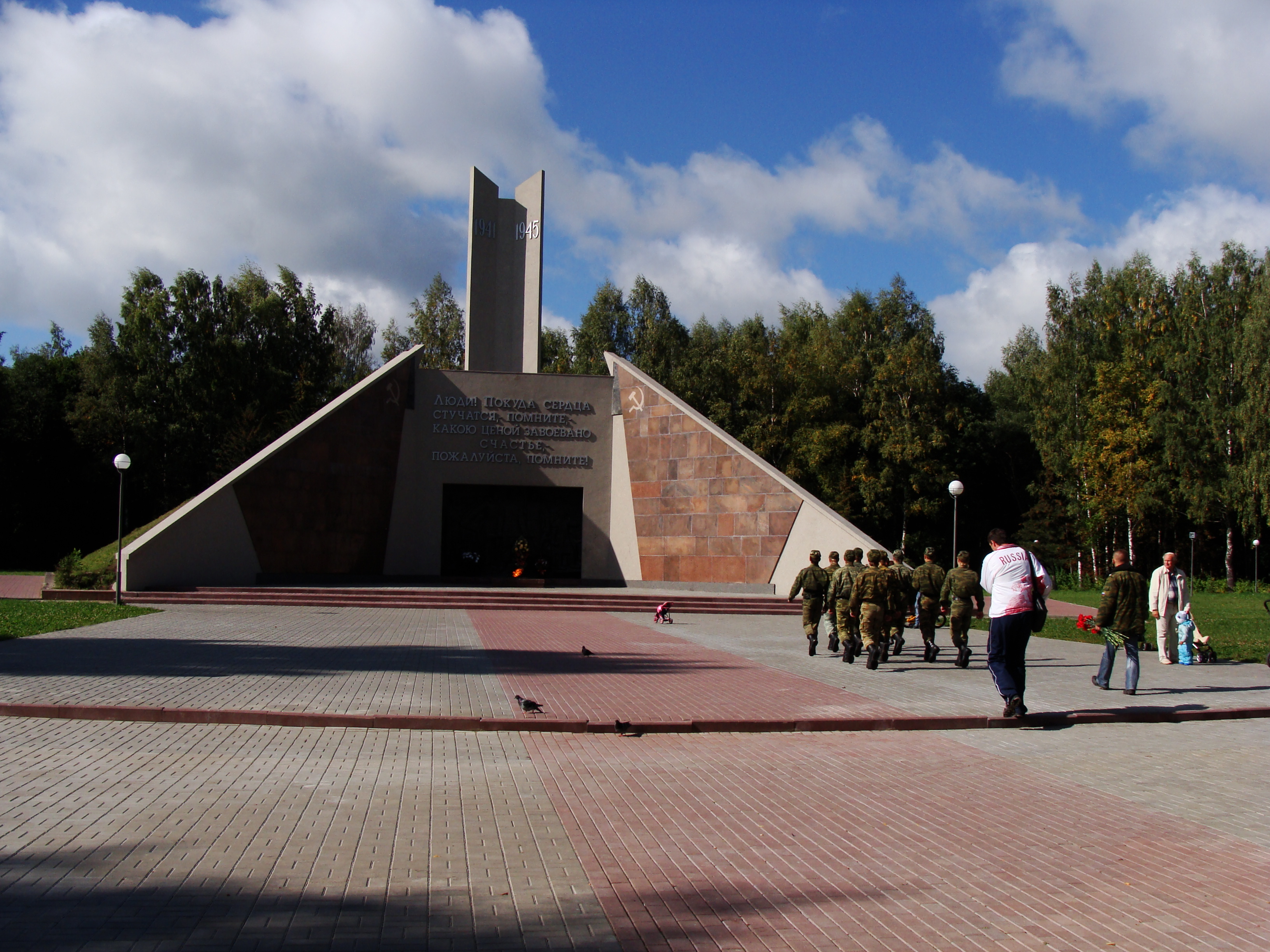 Курган бессмертия в Смоленске